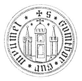 Das Komtursiegel von 1409 symbolisiert die drei ältesten Memeler Kirchen: Stadtkirche St. Johannis (links), Burgkapelle St. Marien (Mitte), Landkirche St. Nikolai (rechts). St. Marien hatte keinen Turm, sondern nur eine Kuppel. Beachtenswert ist, dass das Siegel auch die Lage der Marienkirche tief unten am Haff zeigt, während die beiden anderen Kirchen weiter landeinwärts dargestellt werden.